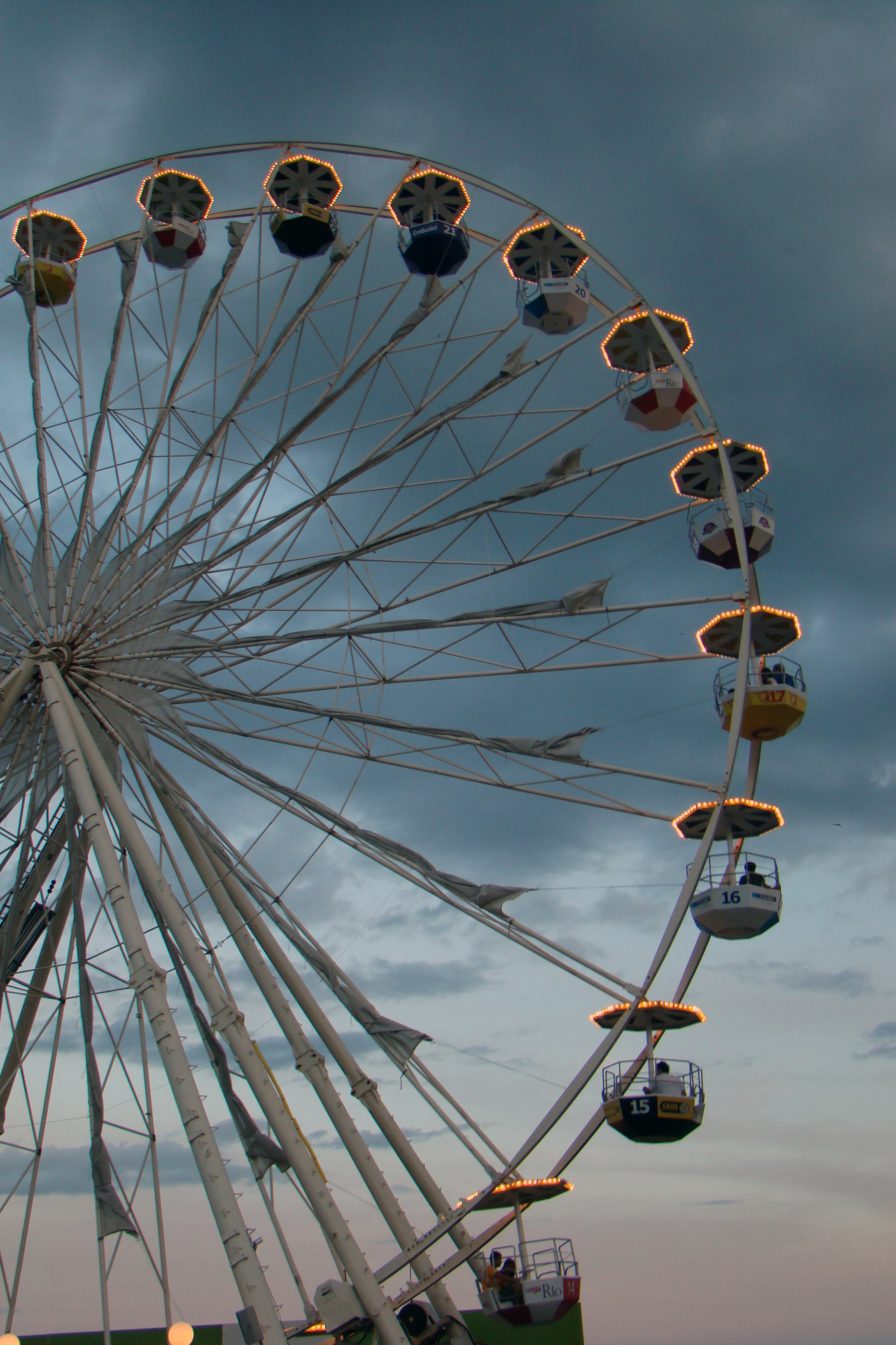 Forte de Copacabana, Rio de Janeiro, Brasil.